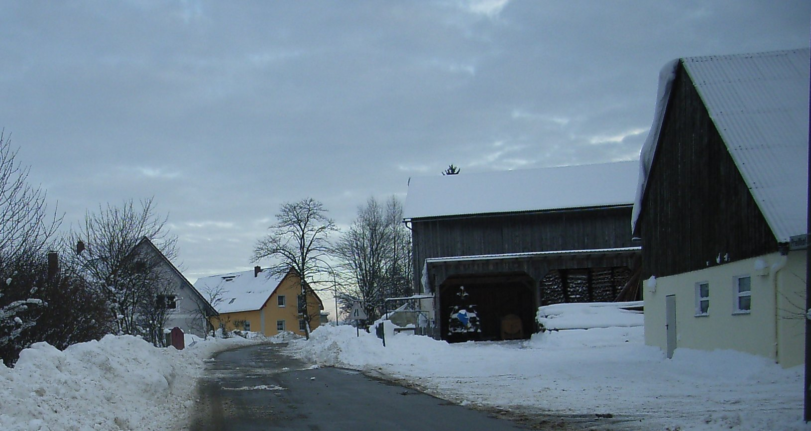 Preißhof bei Weiding (2012)